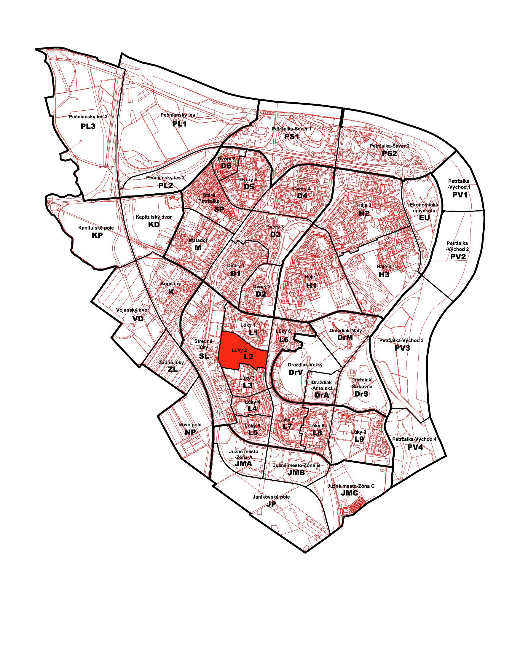 Poloha petržalskej miestnej časti